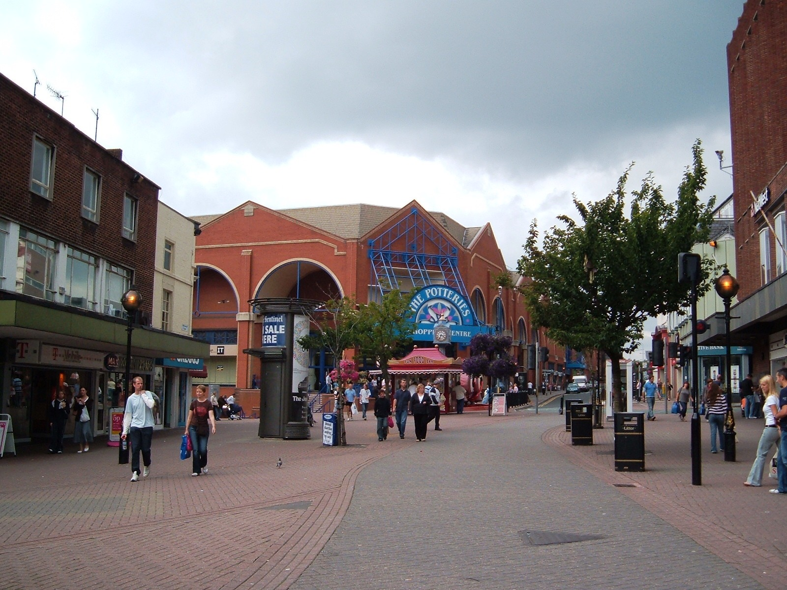 Centro ciudad de Hanley, Stoke-on-Trent.